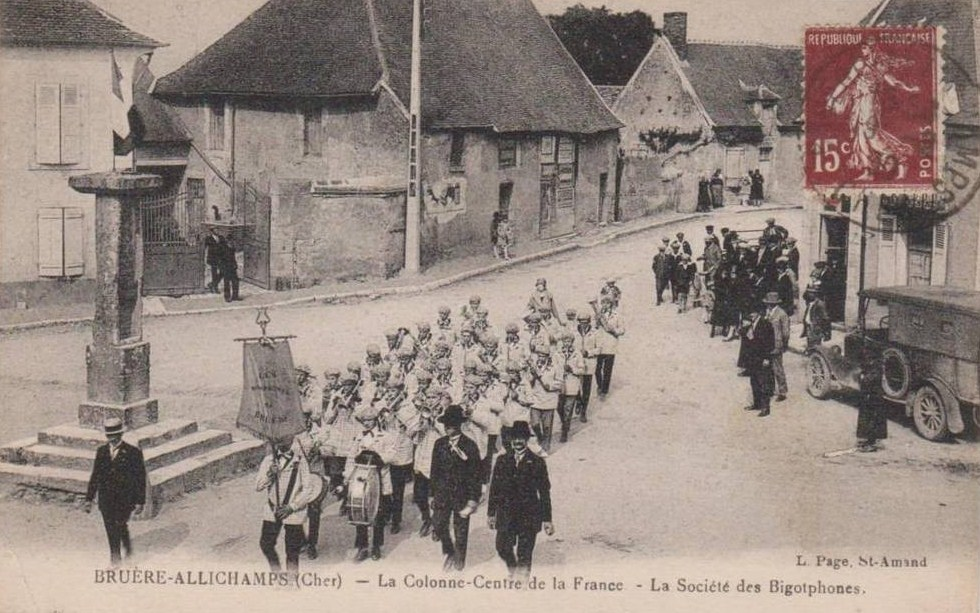 Défilé de la Société des Bigotphones de Bruère-Allichamps dans les années 1920.